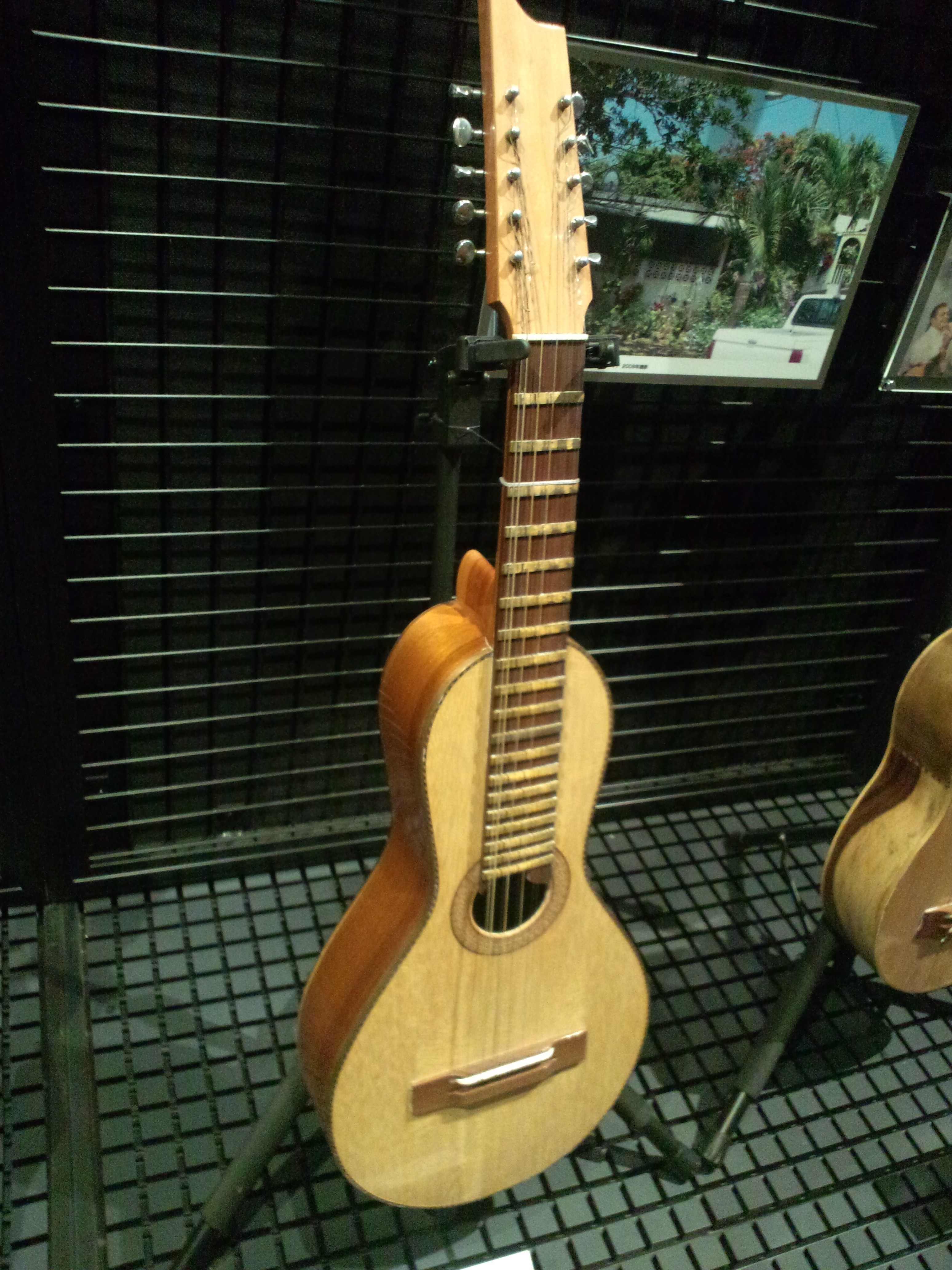 国立民族学博物館（大阪） ボルドヌア（プエルト・リコ、2008年収集）